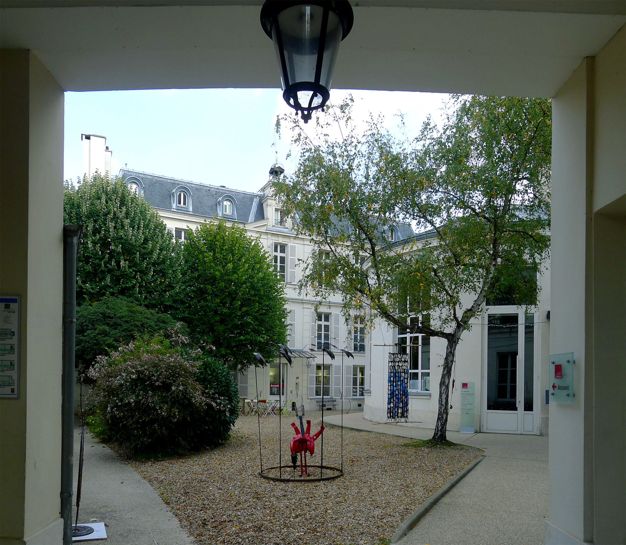 Faculté de théologie protestante de Paris (entrée) - Paris XIV